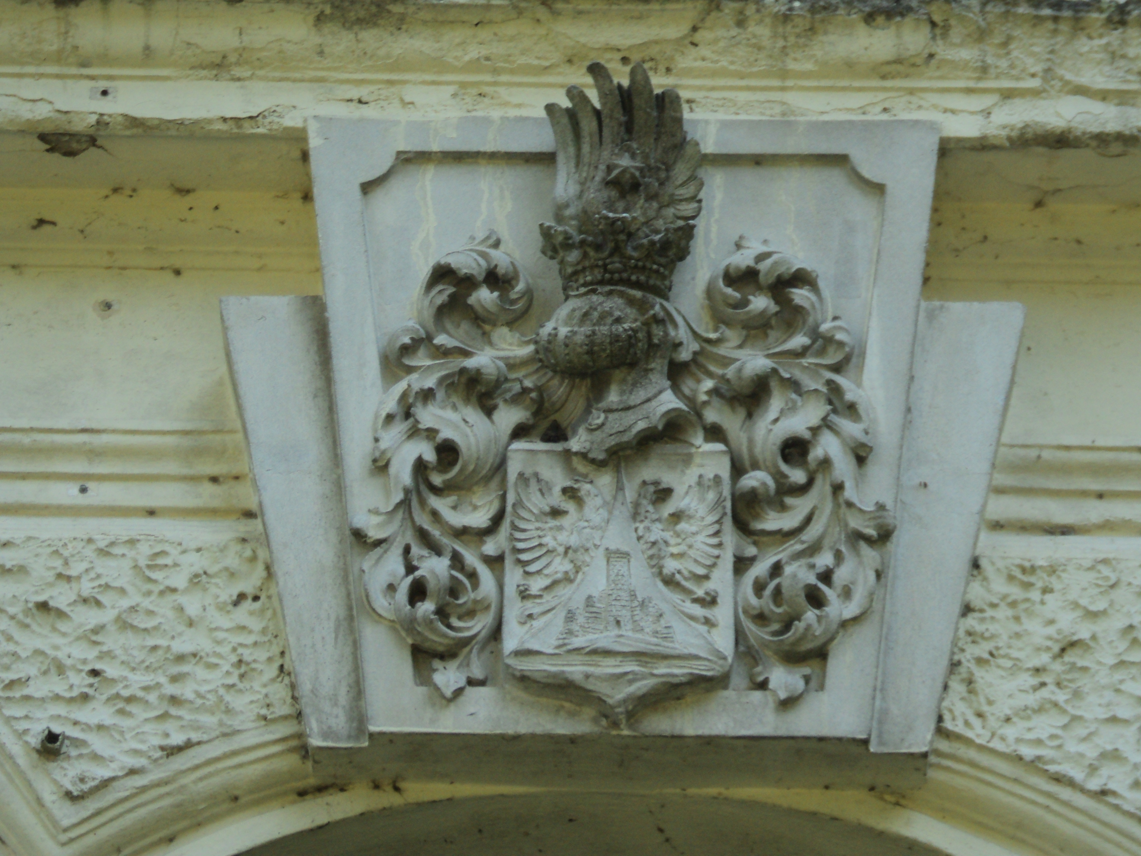 Grb plemićke obitelji Türk iznad ulaza u dvorac Türk - Mažuranić.